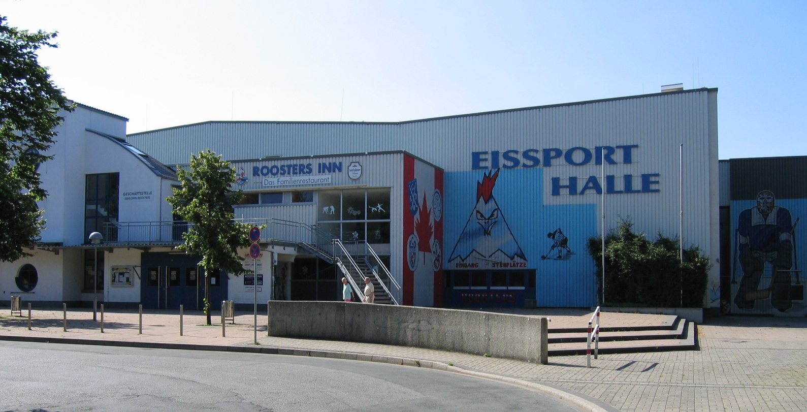 Eissporthalle in Iserlohn (Germany). Graffitikünstler: Stefan Dressler, geb. 1968 aus Nachrodt-Wiblingwerde.